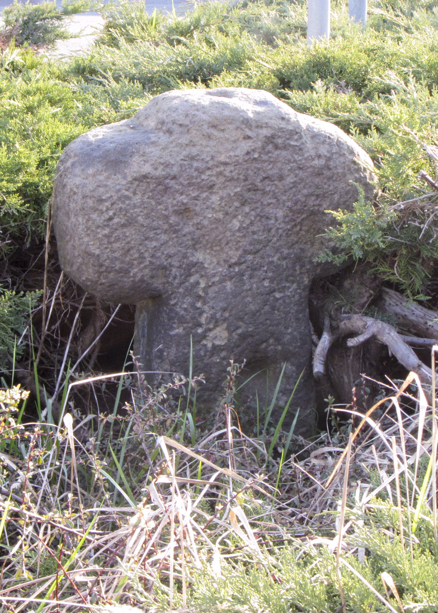 Steinkreuz in Schköna